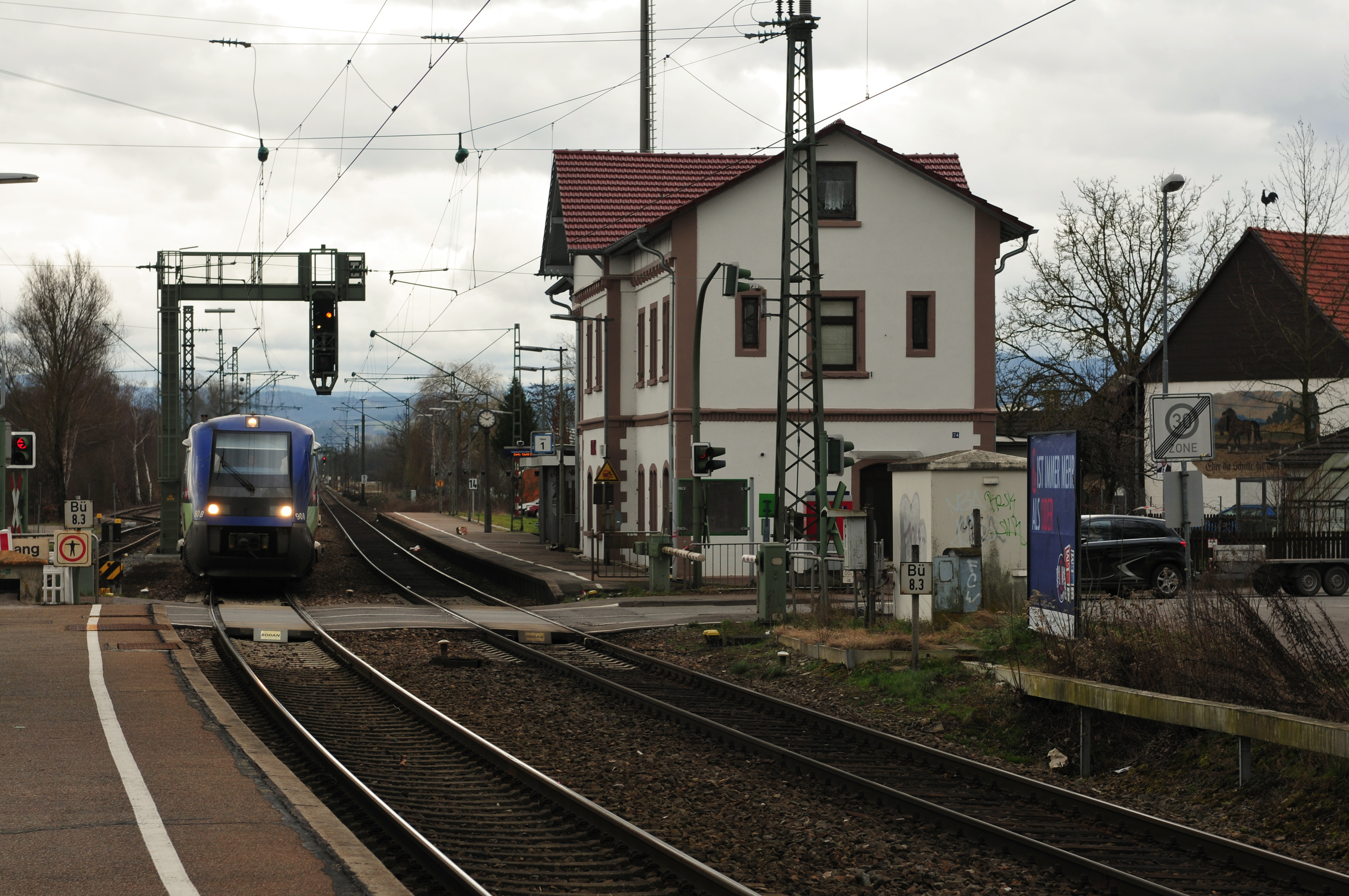 Kork European Parliament 2014 3.–7. February 2014, StrasbourgThis photo has been created within the project "WIKI loves parliaments / European Parliament". Usage and Help If you have any questions concerning this picture or how to use it, feel free to